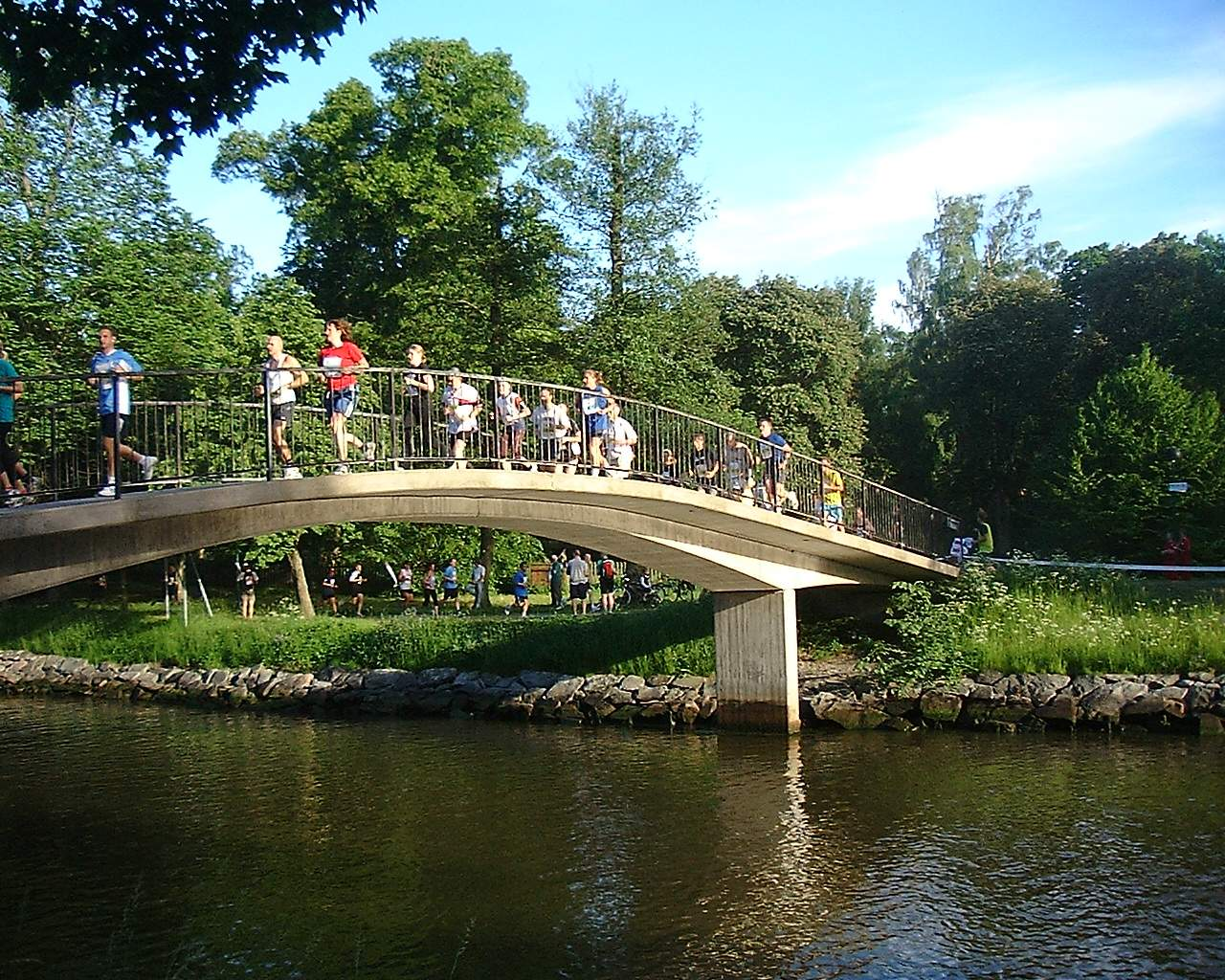 Lilla Sjötullsbron